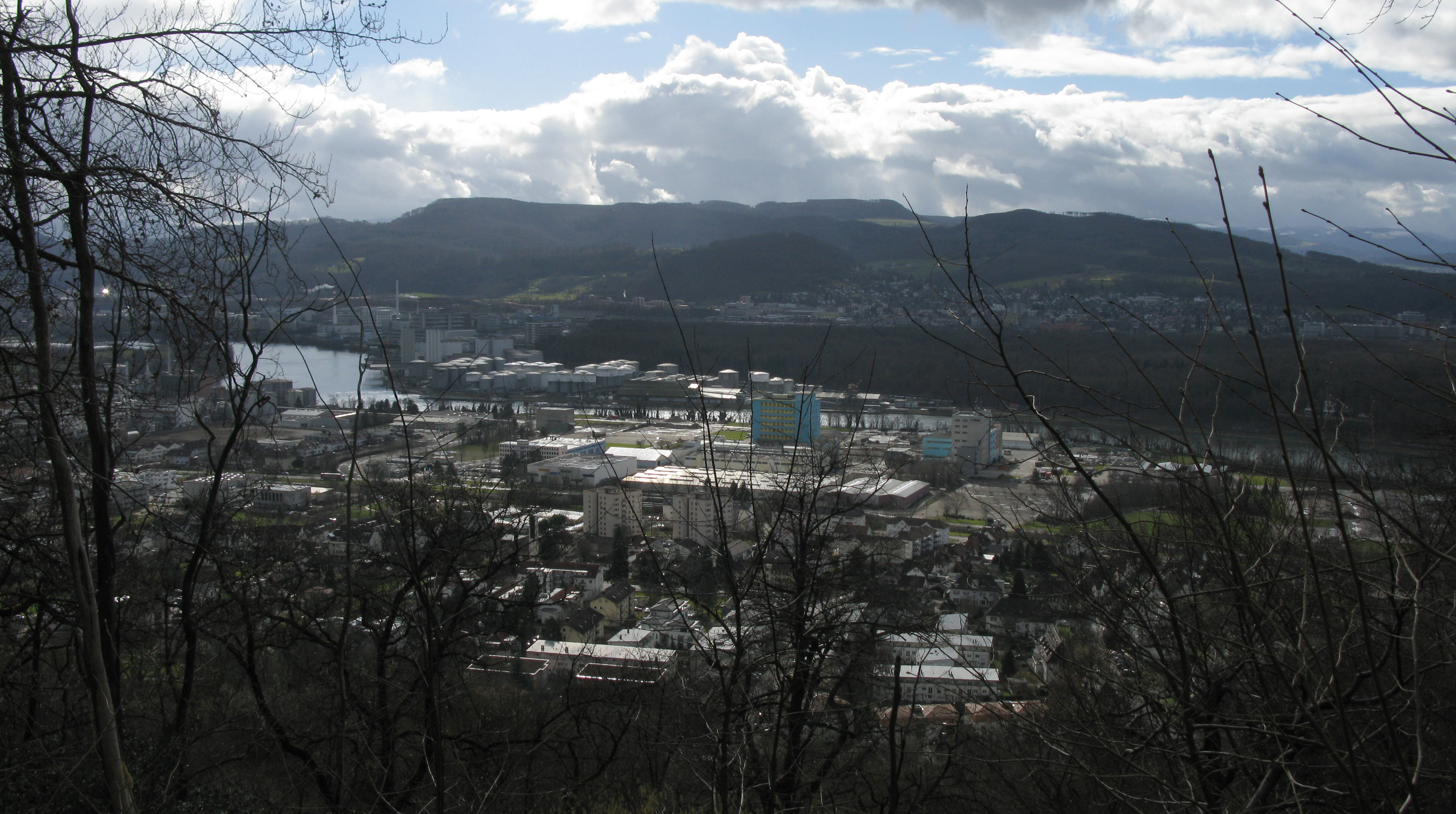 Blick über Grenzach Richtung Schweizerhalle